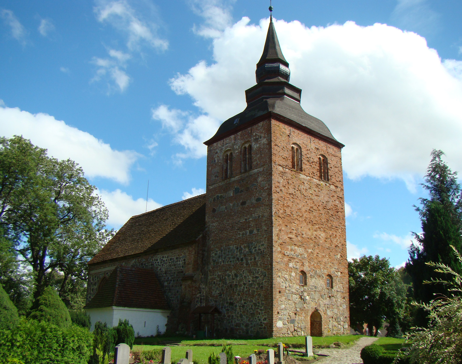 Dorfkirche in Schloen. Foto: Peter Schmelzle 2011